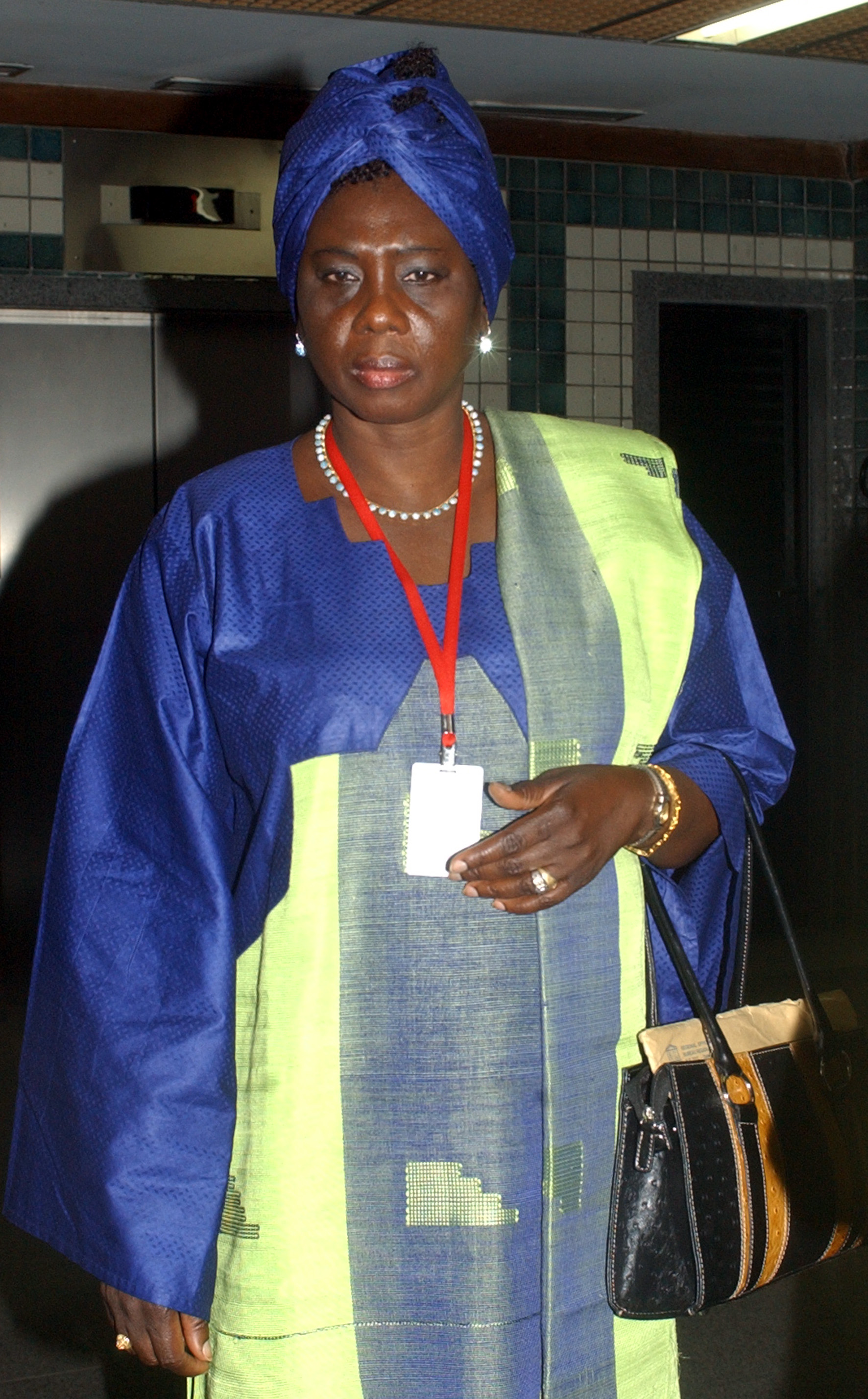 Isatou Touray, participante de Gambia, na 2ª Conferência de Intelectuais da África e da Diáspora, Salvador (BA).